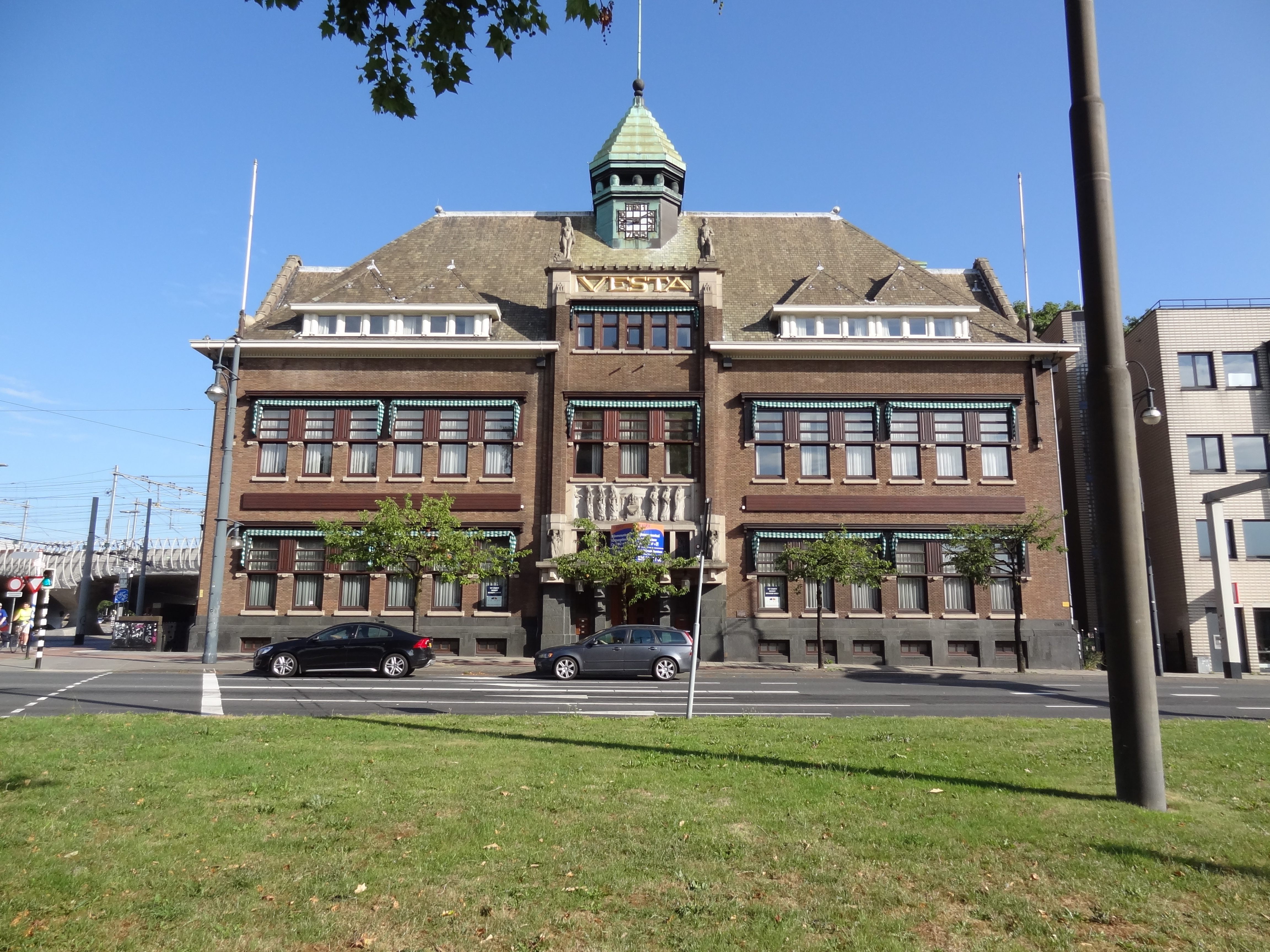 Vestagebouw in Arnhem